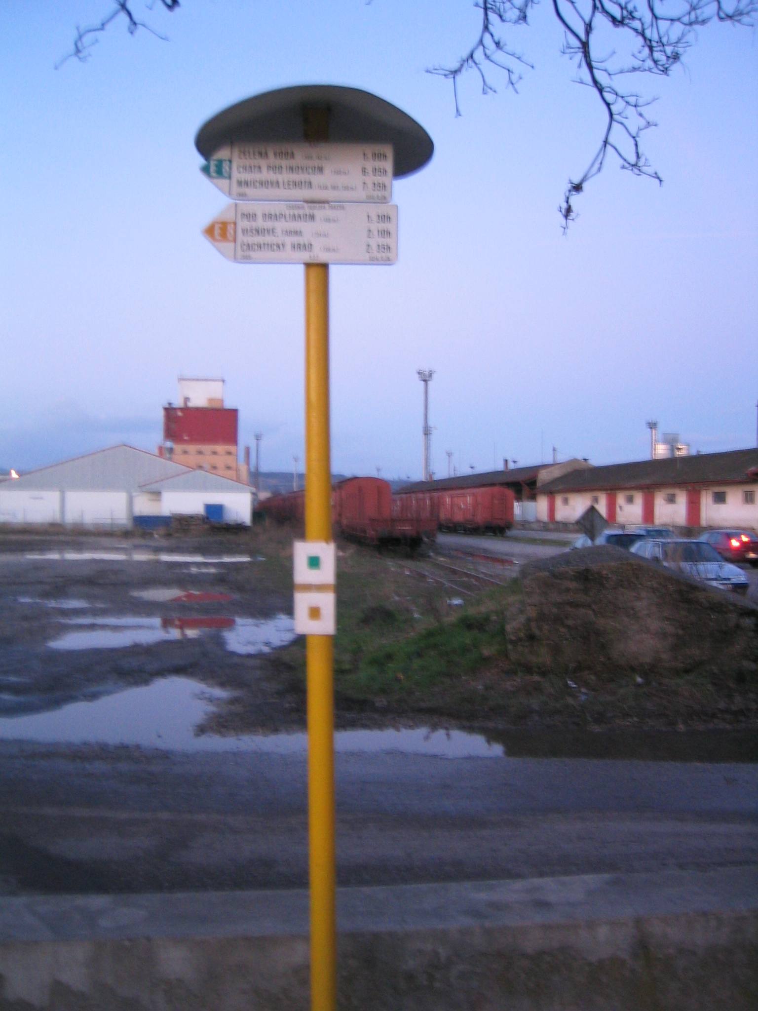 Europäischer Wanderweg in Nové Mesto nad Vahom